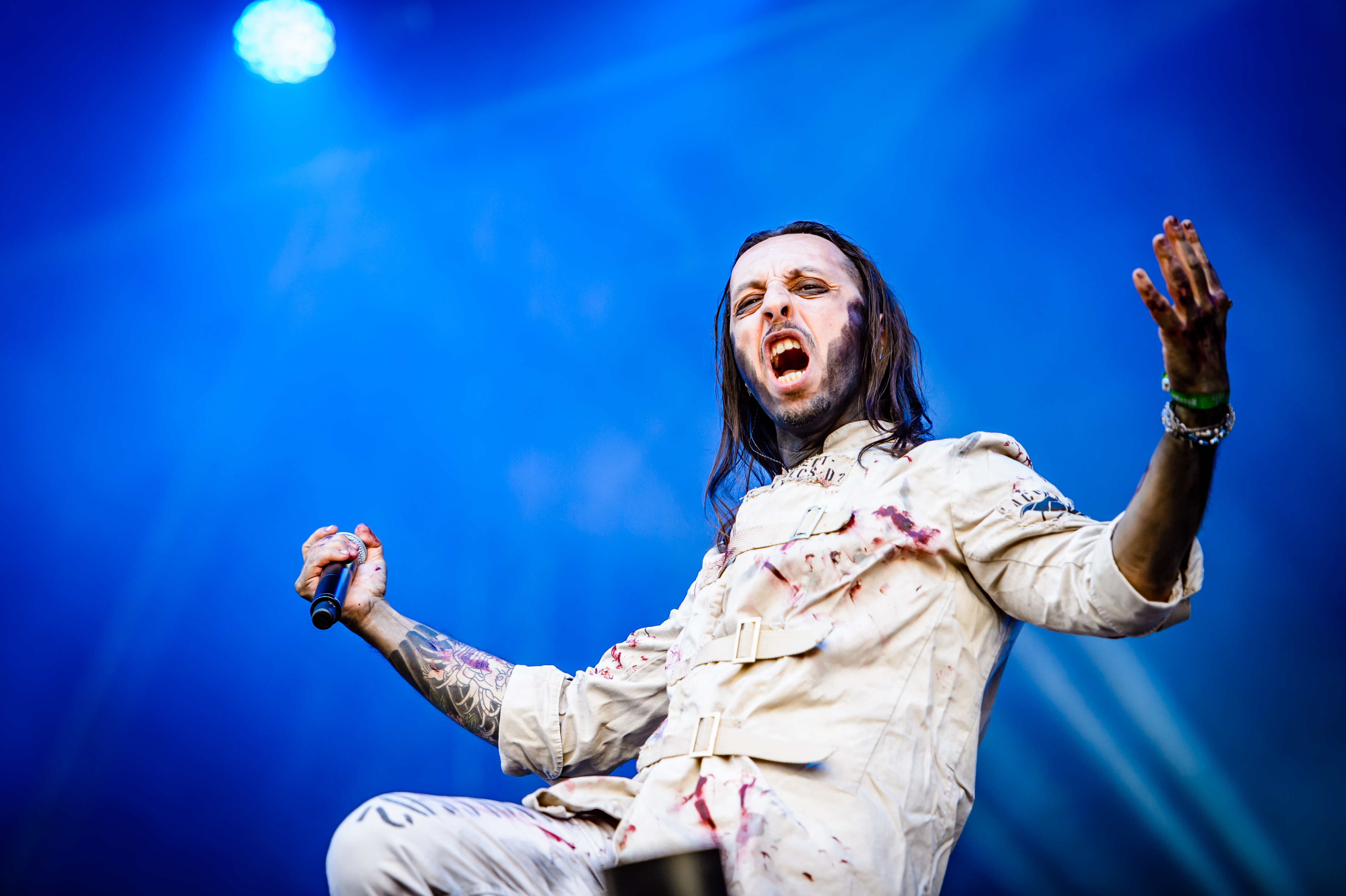 'RockHarz Open Air 2017; Ballenstedt': 'Lacuna Coil'